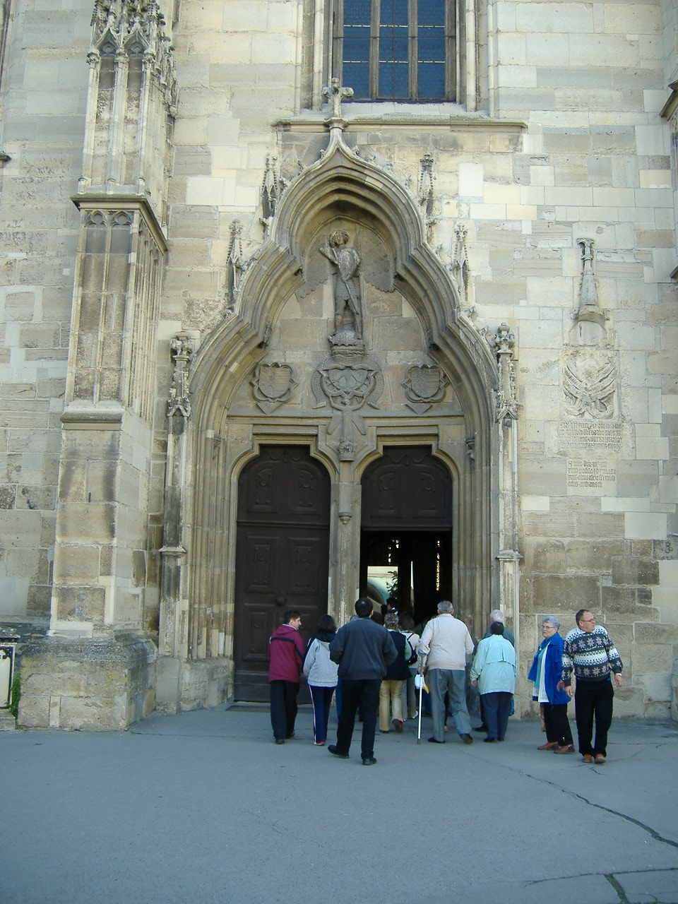 A kolozsvári SzentMihály-templom kapuja